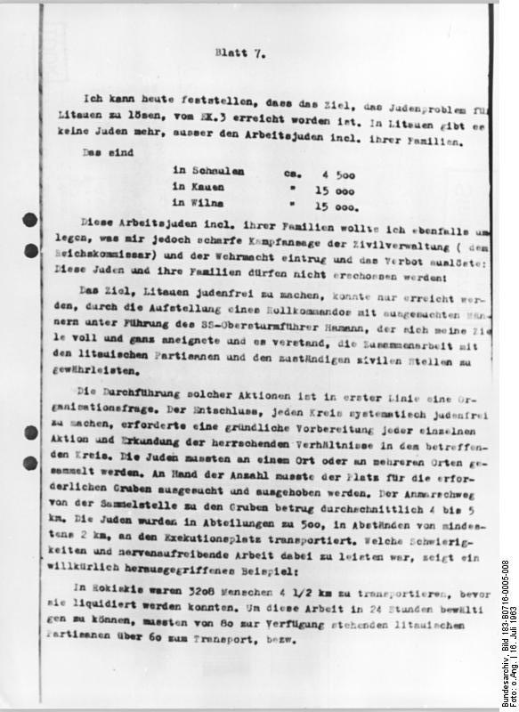 Oberstes Gericht, Globke-Prozess, Beweisstück Zentralbild 16.7.1963 Dokumente über faschistische Greuel aus der UdSSR. UBz: Reproduktion der auszugsweise während des 7. Verhandlungstages des Globke-Prozesses am 15. Juli verlesenen Dokumente über faschistische Greuel in der Sowjetunion. Pedantisch genau zieht hier ein SS-Standartenführer Jäger die grausige Bilanz: "In Litauen gibt es keine Juden mehr." (siehe auch 2 - 7 u. 9 - 10N)